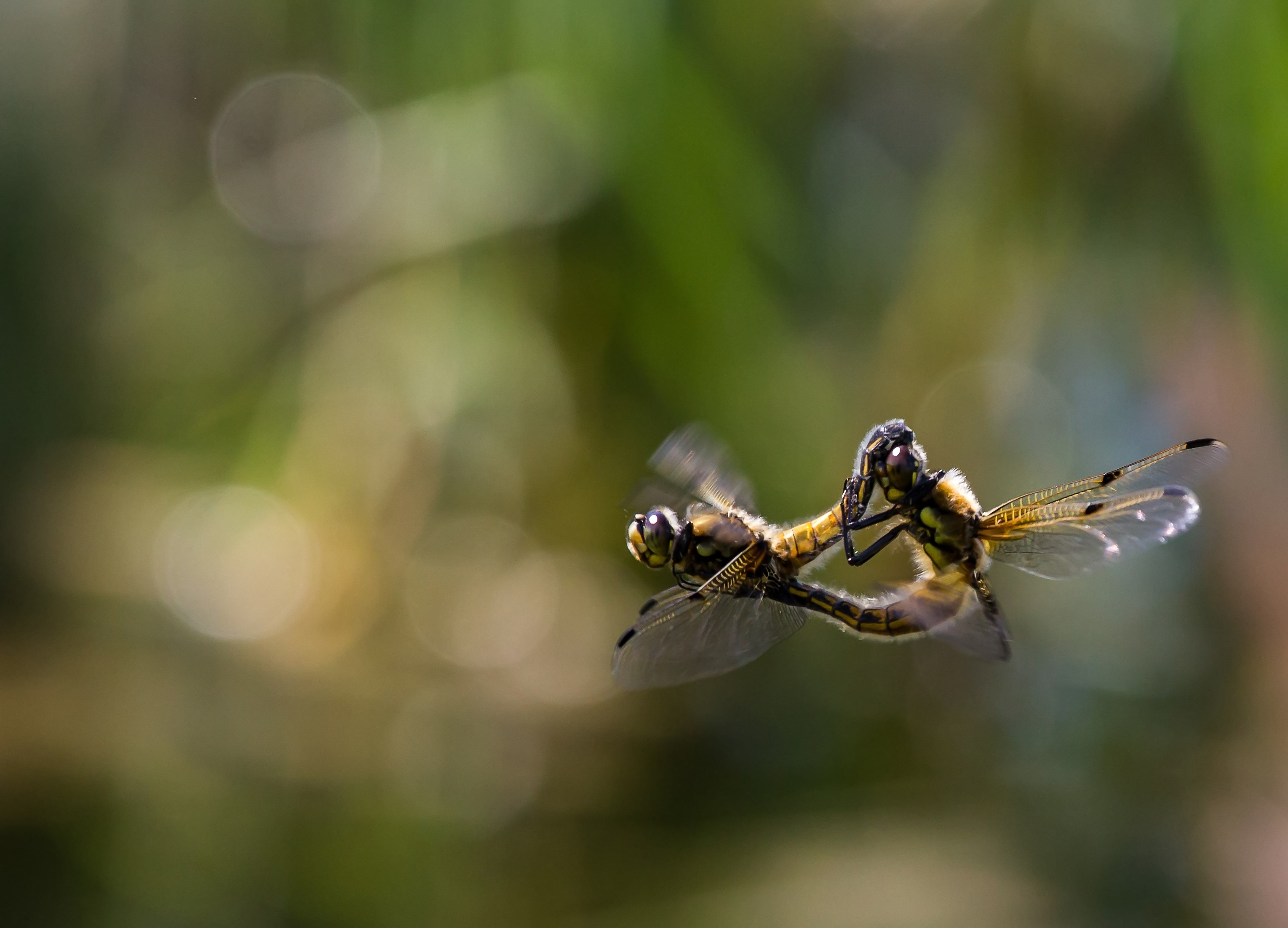 Vierfleck Libelle im Paarungsflug Libellula quadrimaculata while mating